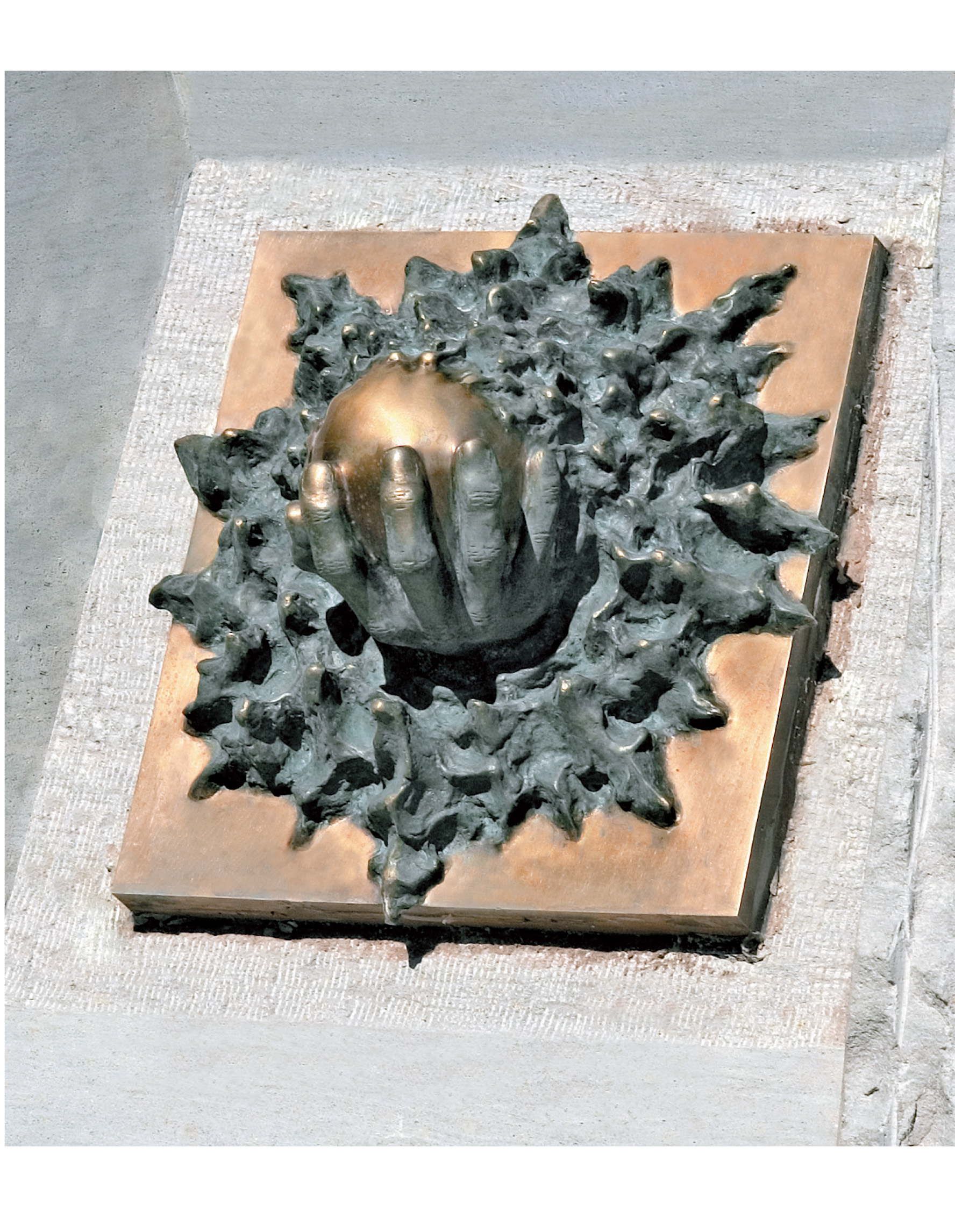 Világunk – homokkőből és bronzból készült kisplasztika a kiskunfélegyházi Dózsa György Általános Iskolában (36x33 cm), Pálfy Gusztáv alkotása (20055)